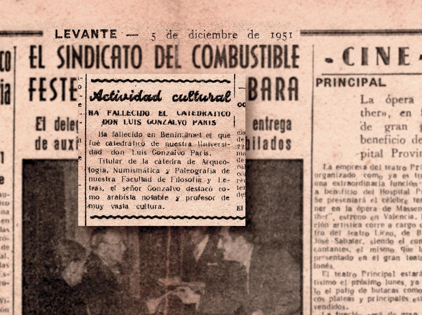 Reseña fallecimiento de Luis Gonzalvo Paris en el Diario Levante